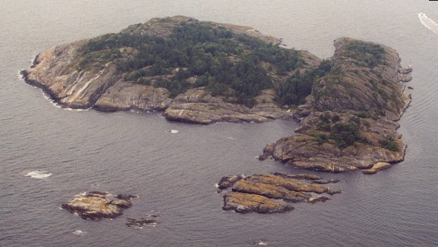 Flyfoto av øya Mejulen